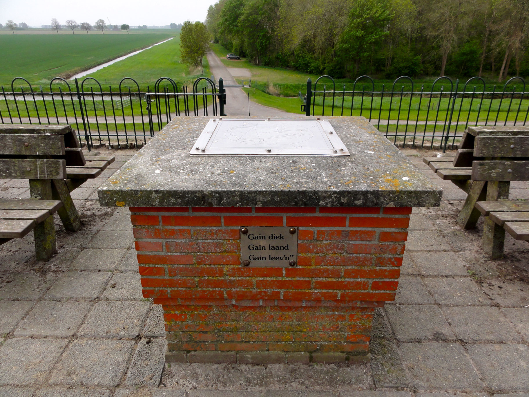 Monument ter gelegenheid van het op deltahoogte brengen van de zeedijken bij de Johannes Kerkhovenpolder en de Carel Coenraadpolder langs de Dollard